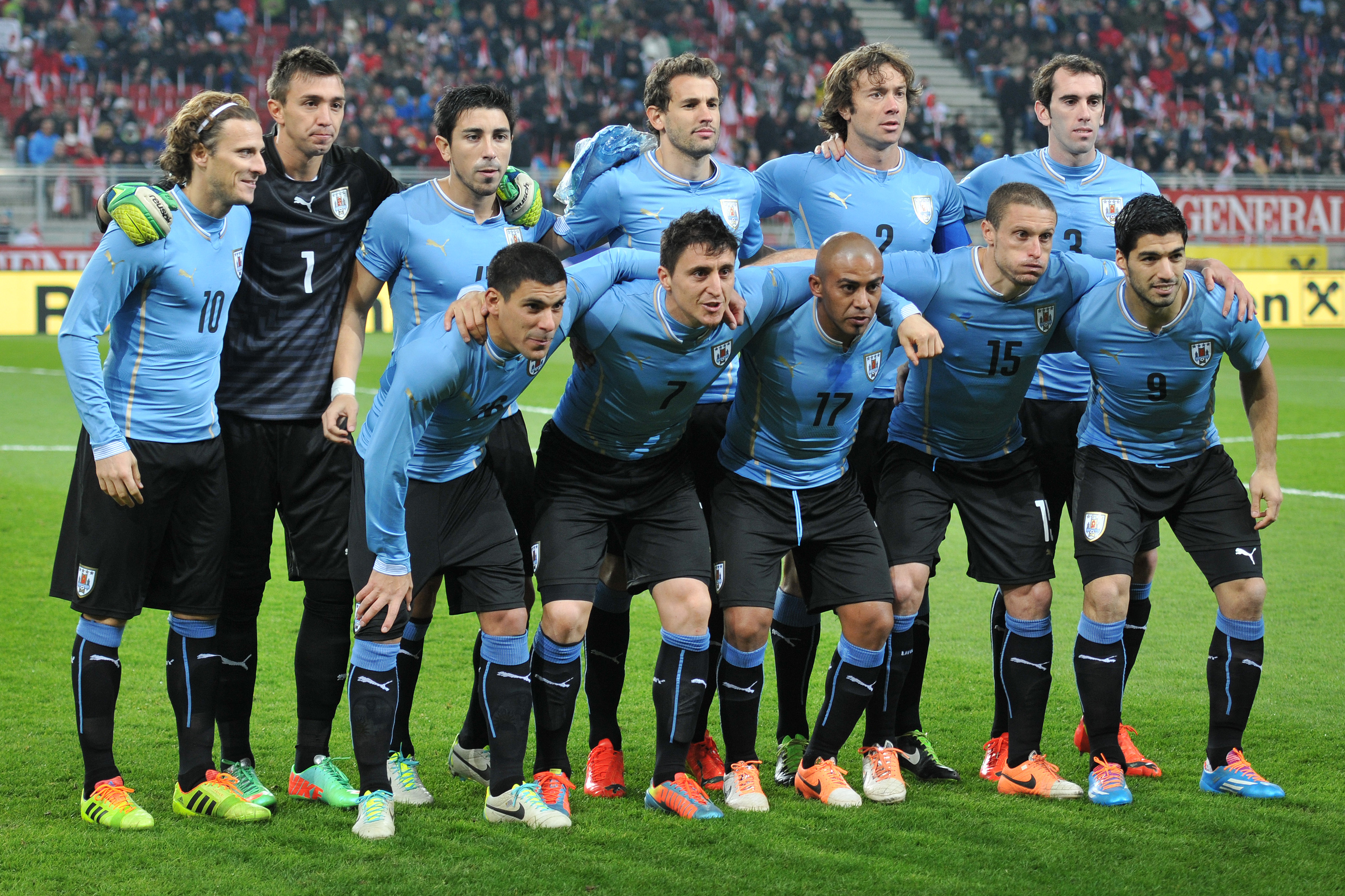 Freundschaftliches Länderspiel Österreich - Uruguay am 5. März 2014 in Klagenfurt: Uruguayische Fußballnationalmannschaft